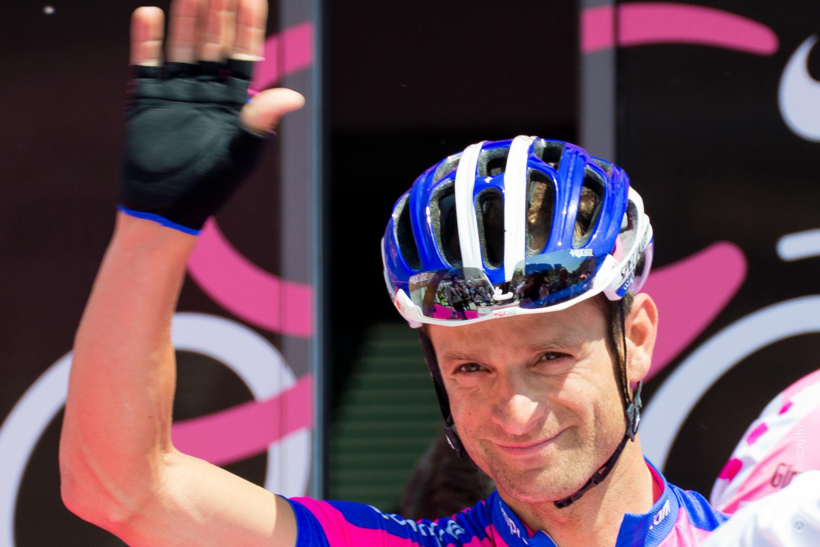 Partenza Giro d'Italia Modena